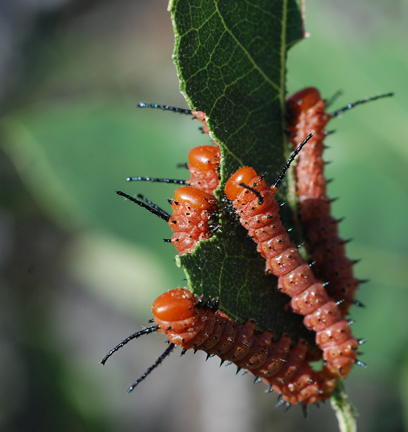 Anisota oslari caterpillars